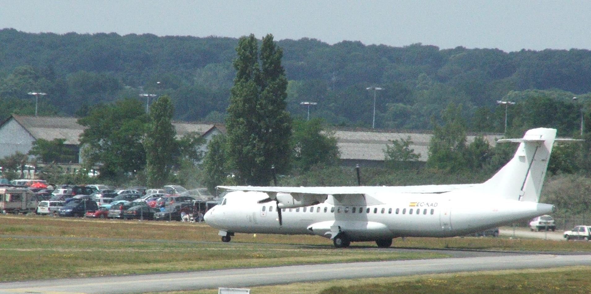 Avion espagnol au roulage sur l'aéroport Le Mans-Arnage lors des 24 heures du Mans 2009.